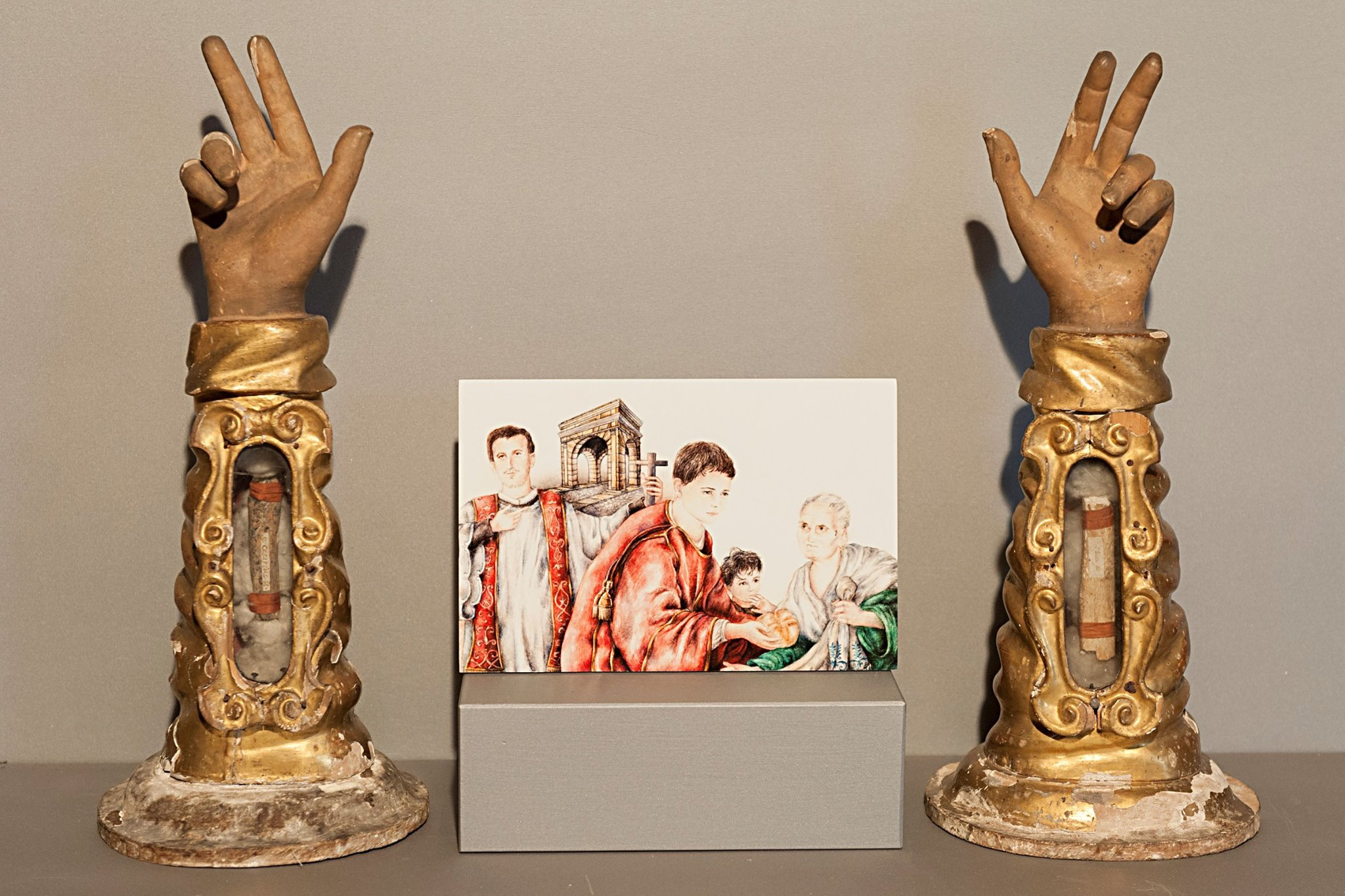 Asola (Mantova), Museo Parrocchiale di Arte Sacra "Giovanni Battista Tosio", Chiesa Cattedrale di Sant'Andrea: i bracci-reliquiari dei SS. Cesario e Giuliano. Foto Rosanna Viapiana